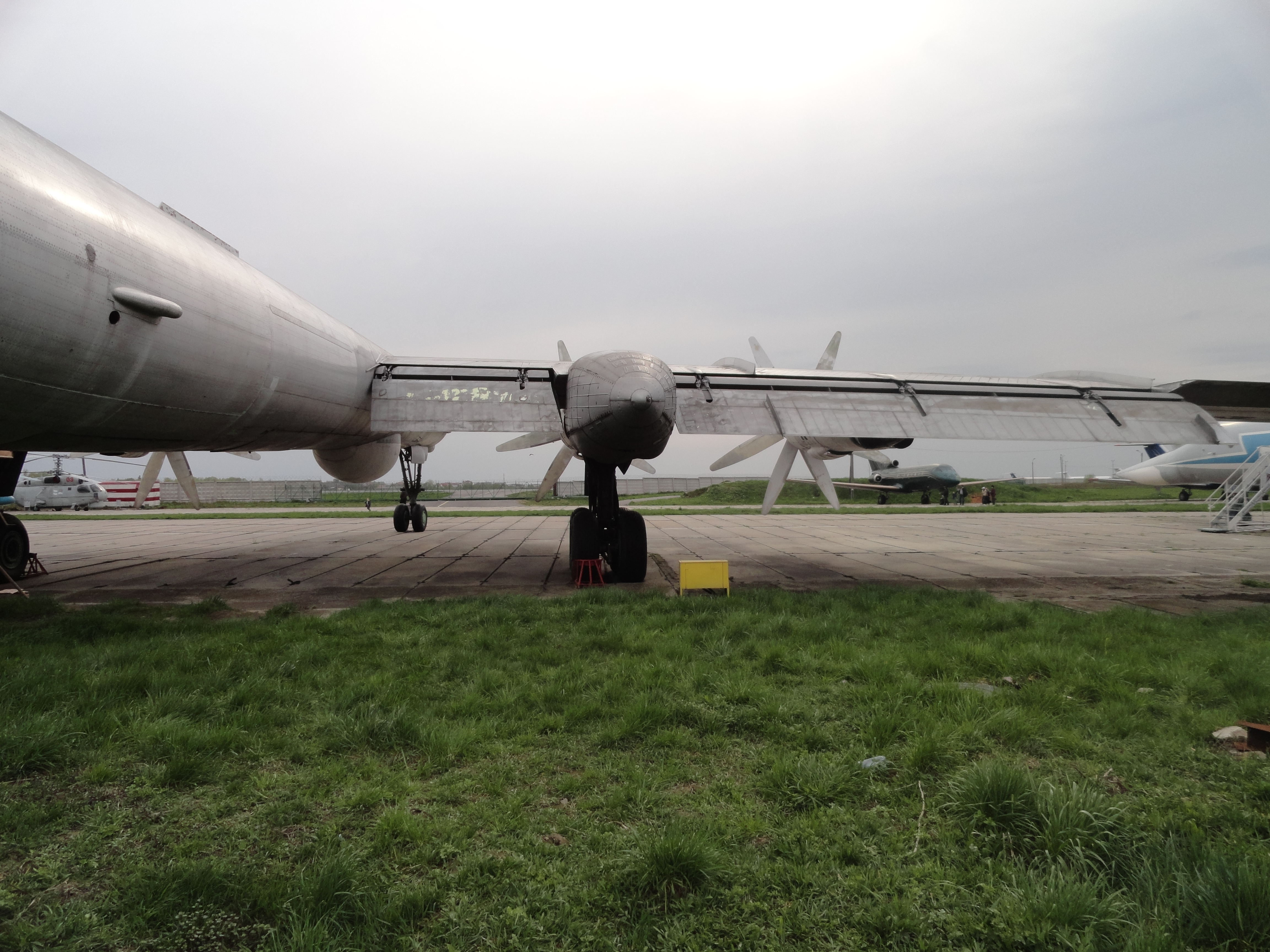 Крыло самолёта Ту-142. Музей авиации Киев